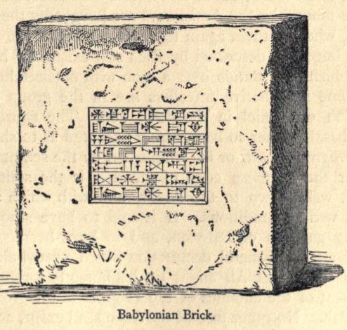 Ein Baustein aus Babel mit der Inschrift Nebukadnezar. Gefunden von Austen H. Layard 1850